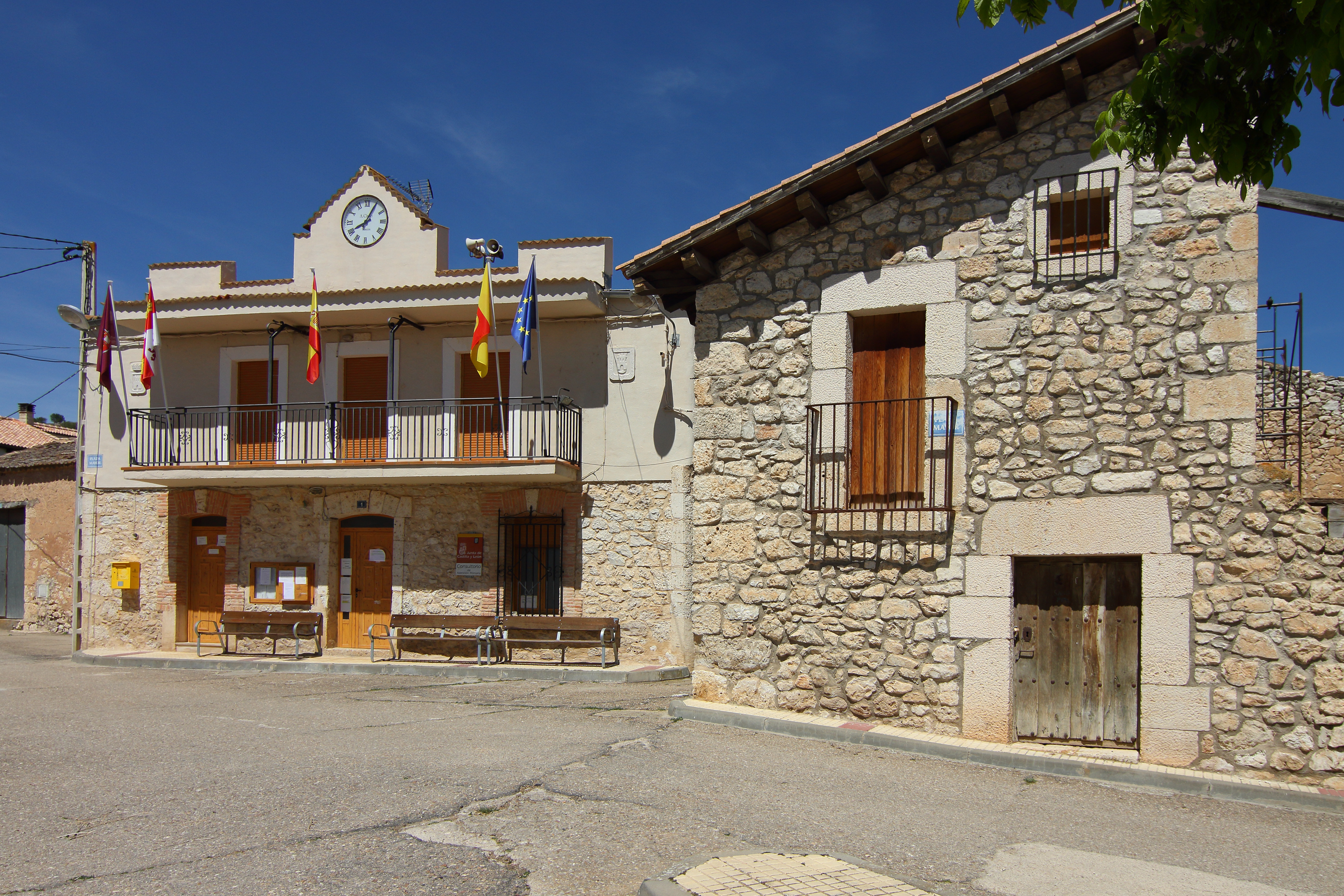 La Sequera de Haza, Plaza Mayor, Casa Consistorial